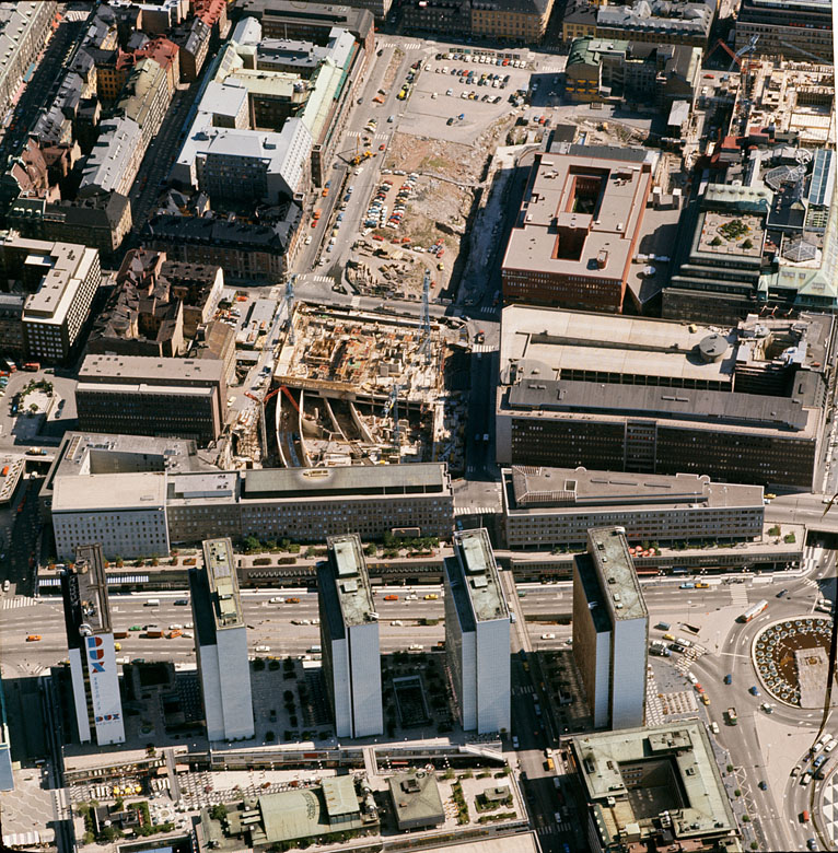 Hötorgsskraporna, Sveavägen, Sergels torg. City. Rivningar Motiv: Stockholms innerstad Nyckelord: Flygbilder, Riksintressen Kategori: Stadsmiljö Hötorgsskraporna, Sveavägen, Sergels torg. City. Rivningar.